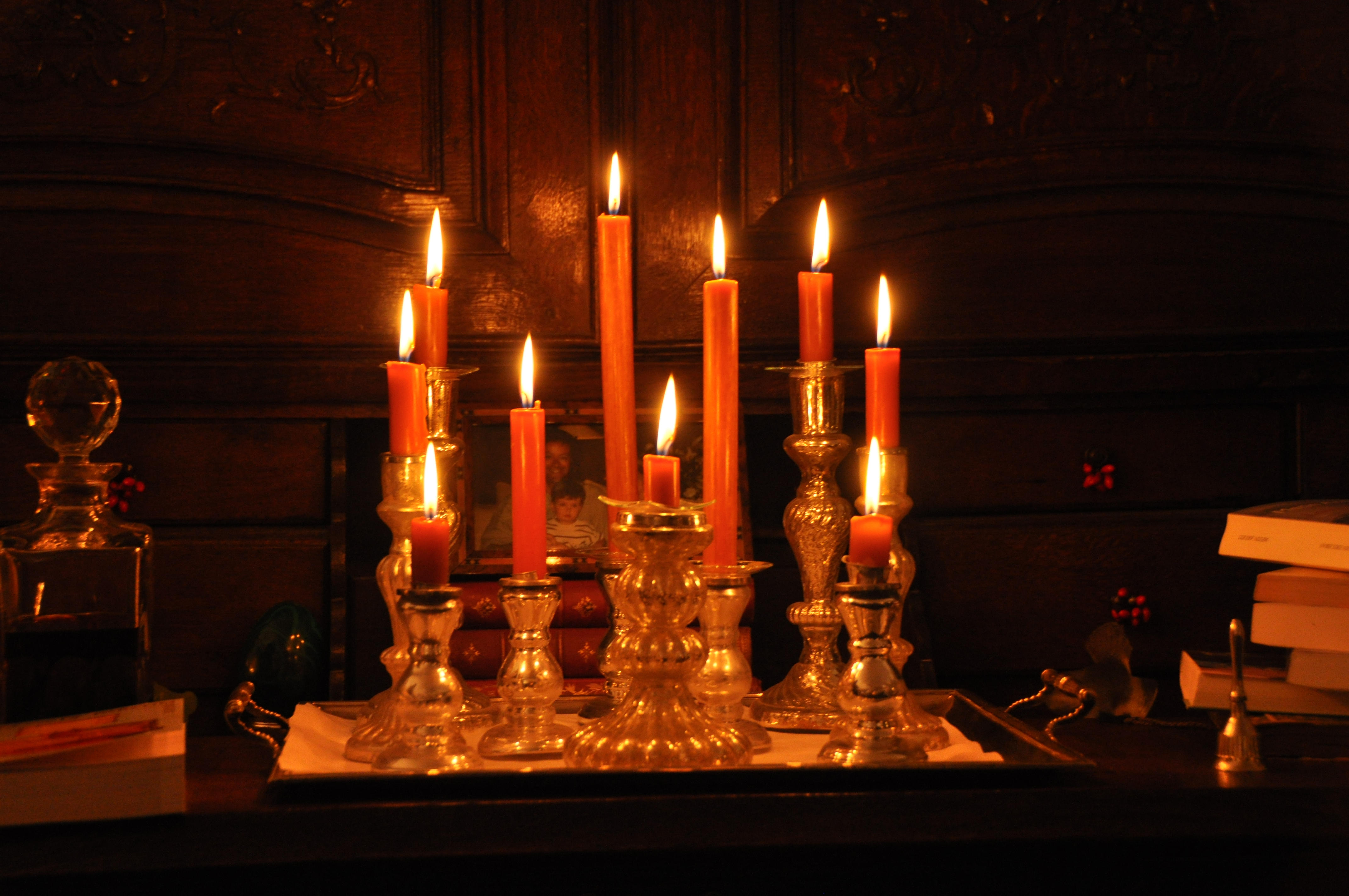 Candles (Christmas 2009)